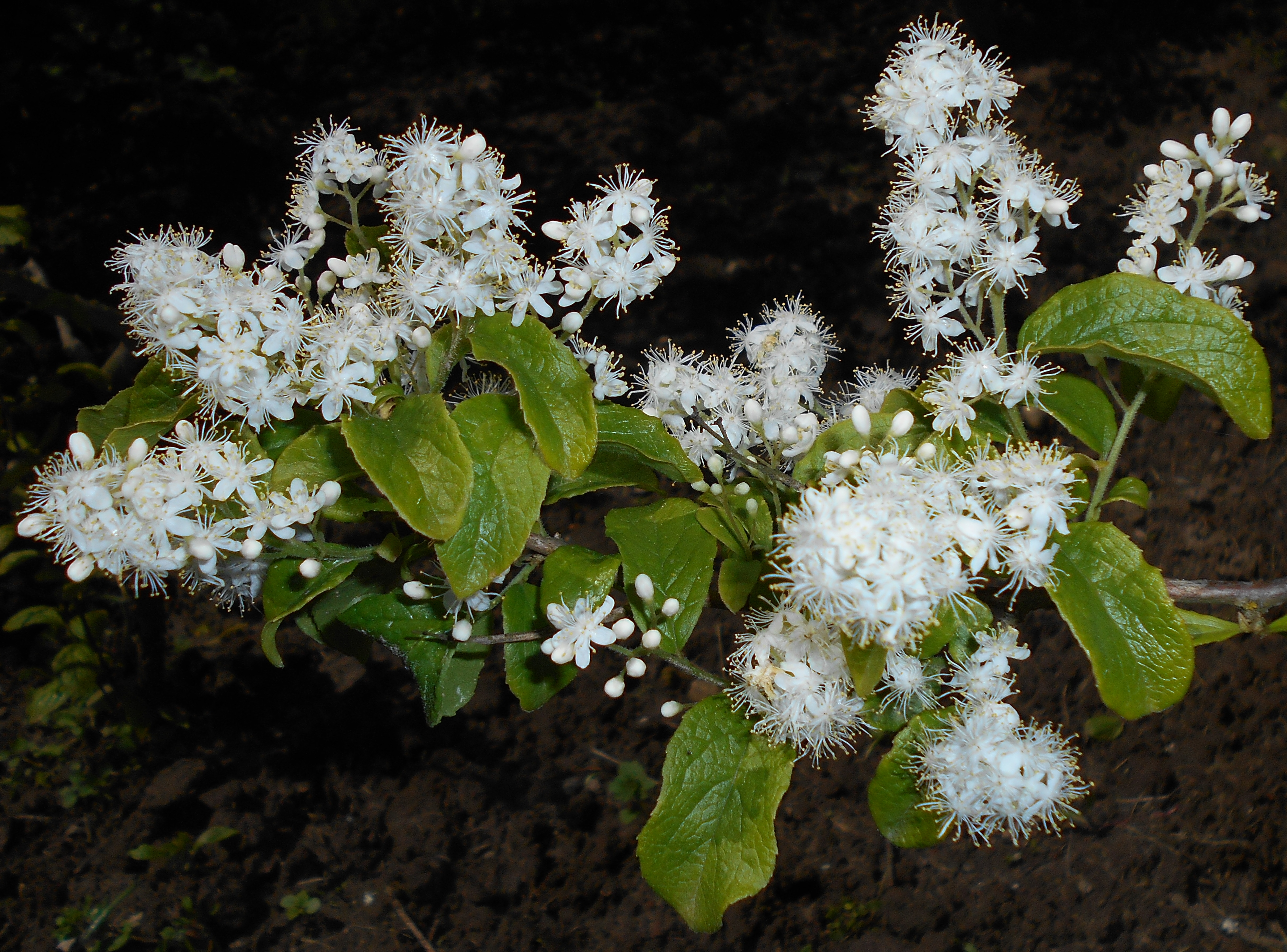 Symplokos wiechowaty (Symplocos paniculata), Ogród Botaniczny UMCS w Lublinie